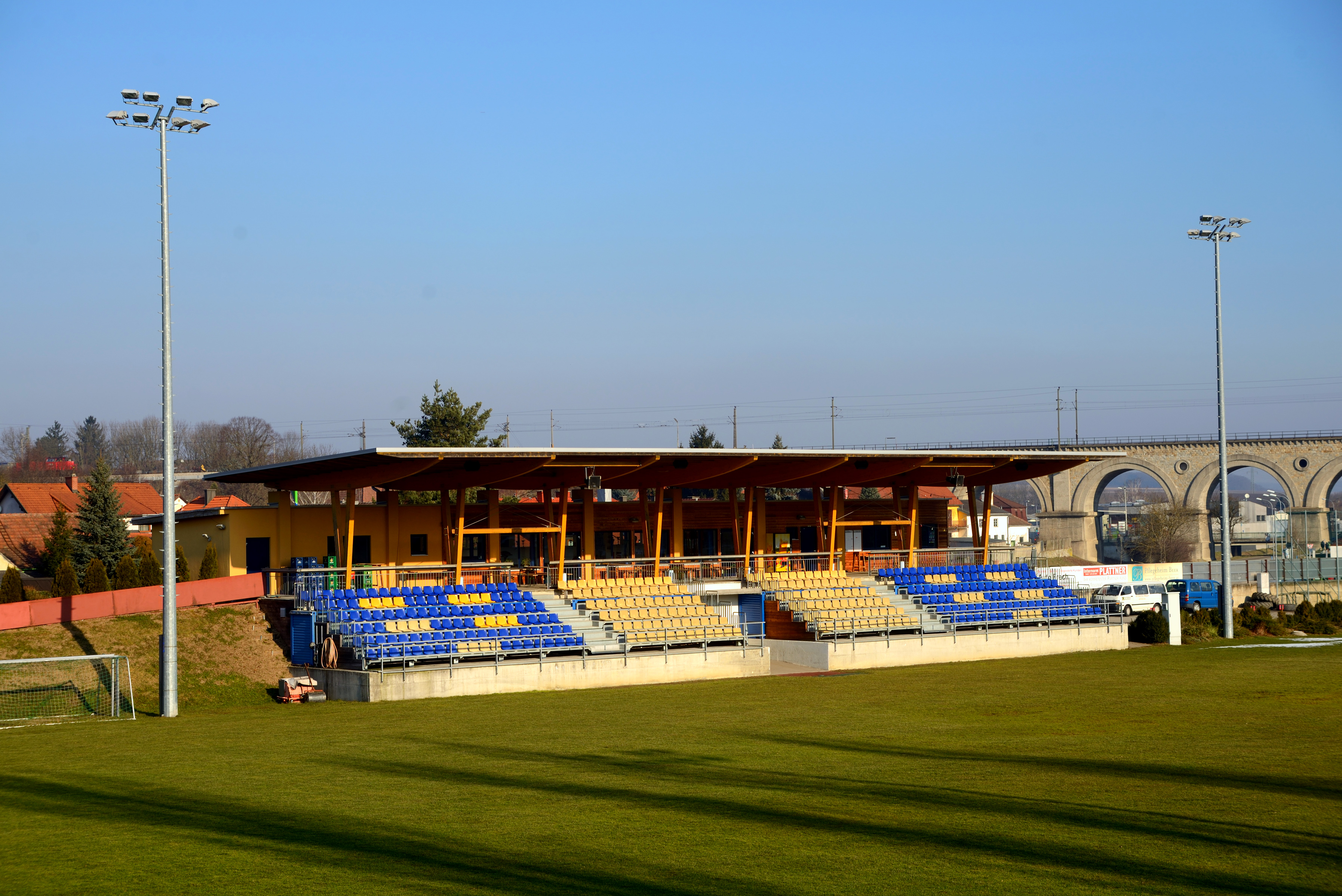 Tribüne des Wienerwaldstadions in Neulengbah